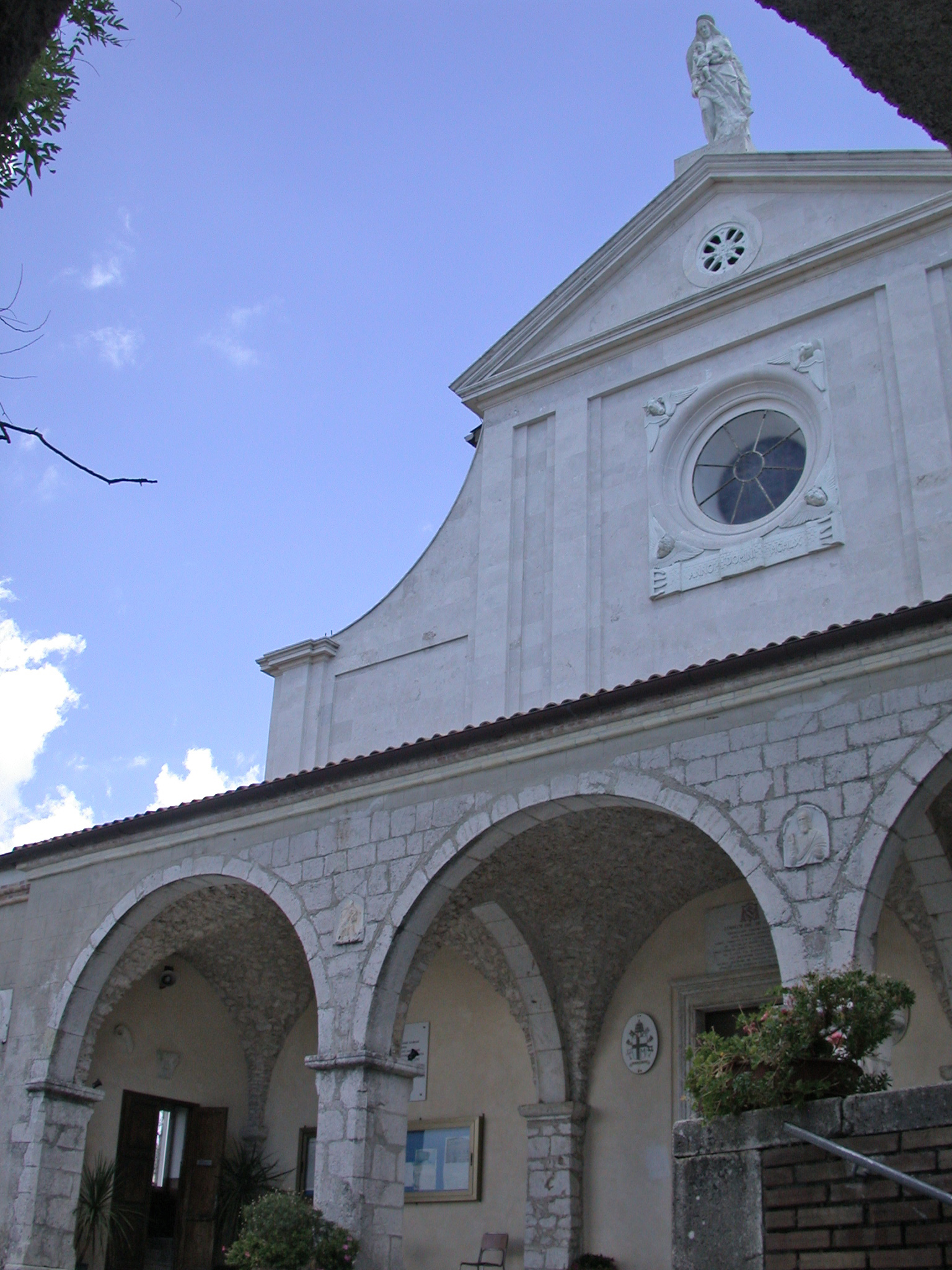 Itri, provincia di Latina, regione Lazio, Italia. Santuario della Madonna della Civita (monte Civita), facciata della chiesa.